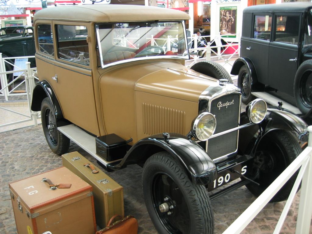 Peugeot Type 190 - Musée Peugeot Sochaux